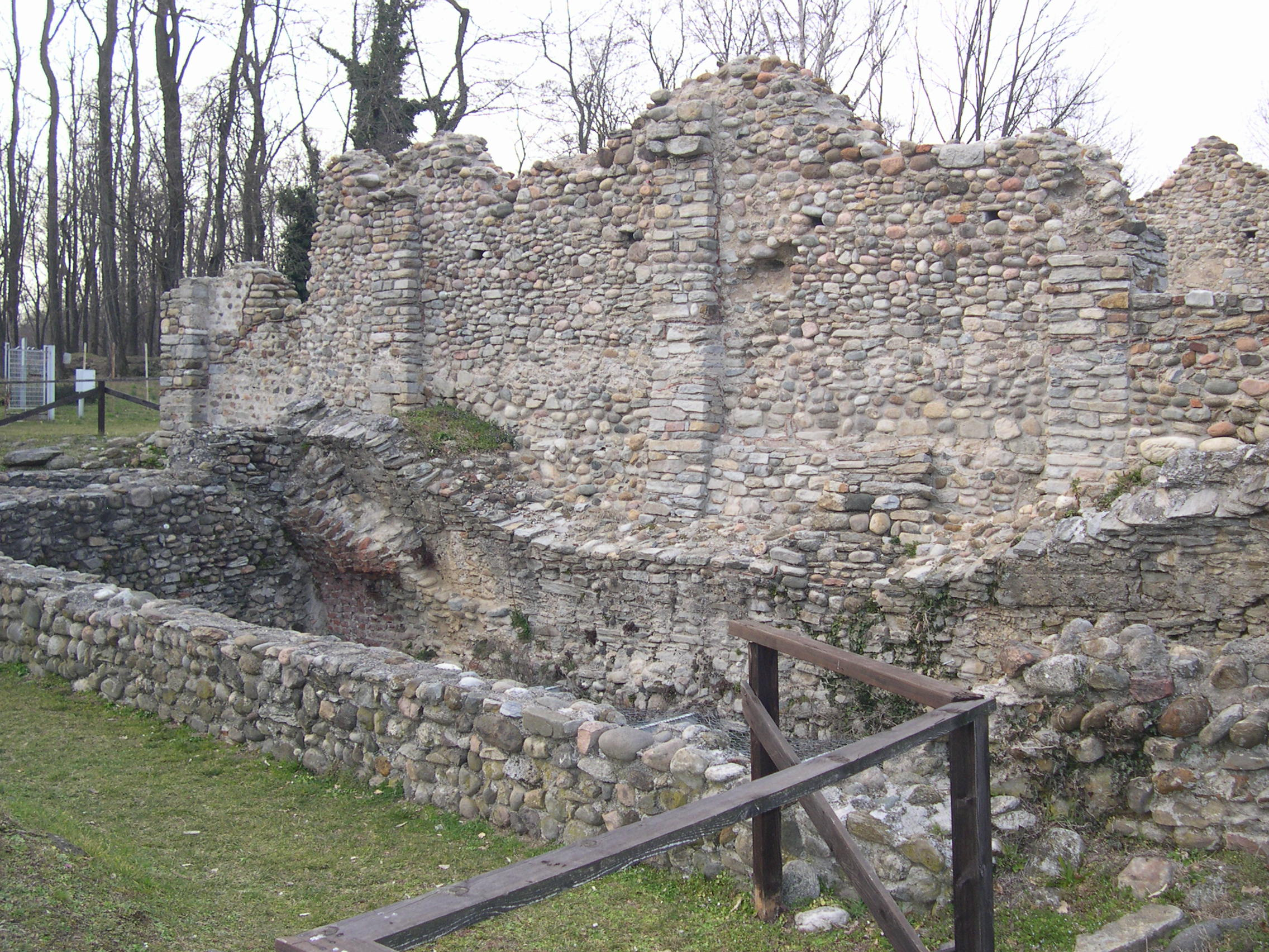 Cisterna nei pressi della Chiesa di San Giovanni, Castrum di Castelseprio